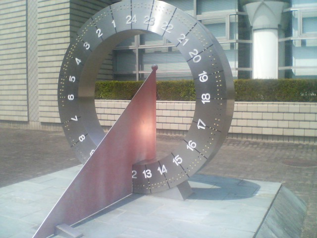 Sundial at Bunka-no-mori (Cultural Forest), Tokushima, Japan